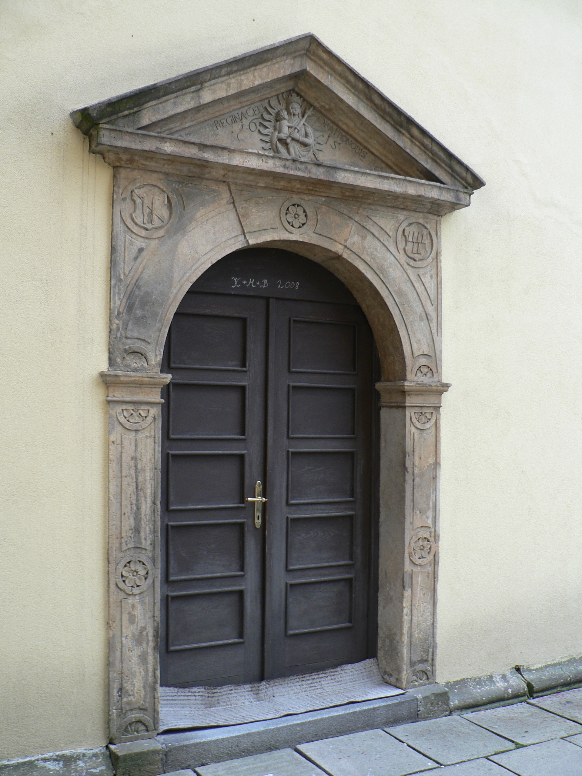 Kostel svatého Jiří (Moravičany) - renesanční vstupní portál z roku 1615